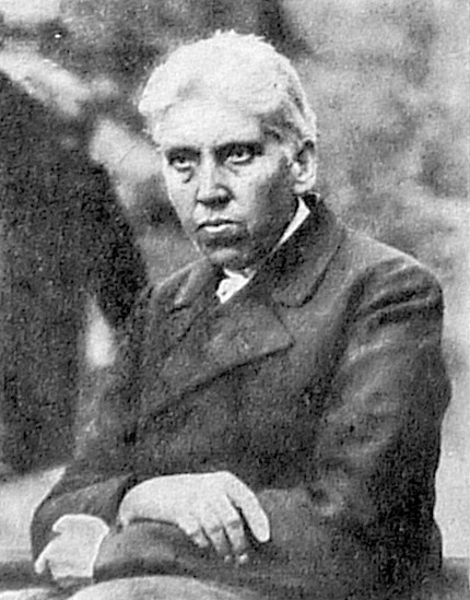 Ф.С. Мочалкин, заведующий Измайловской пасекой на протяжении 25 лет до своей кончины 20 февраля 1910.